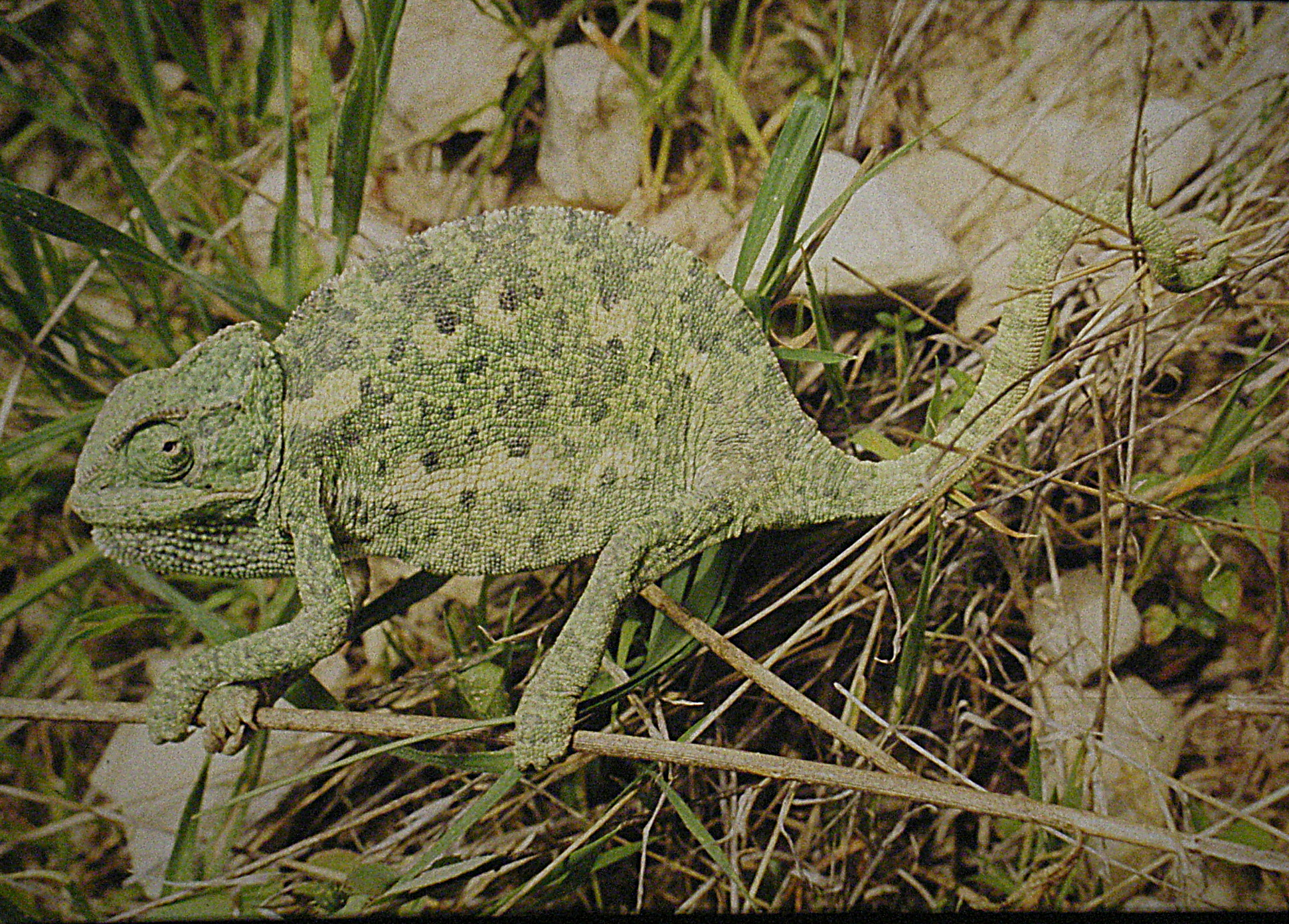 Chamaeleon1 eine halbe Minute vor Chamaeleon2, auf Kreta